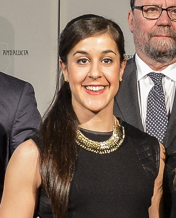 14.112.19-Premios-1Joven IAJ